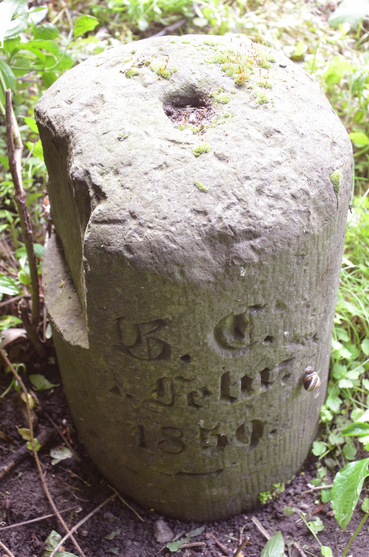 Der Duellstein am Fuß des Rodelberges in Hannover im Stadtteil Kleefeld erinnert an den am 1. Februar 1859 durch ein Pistolenduell zu Tode gekommen Marineoffizier Leutnant Georg Chüden ...